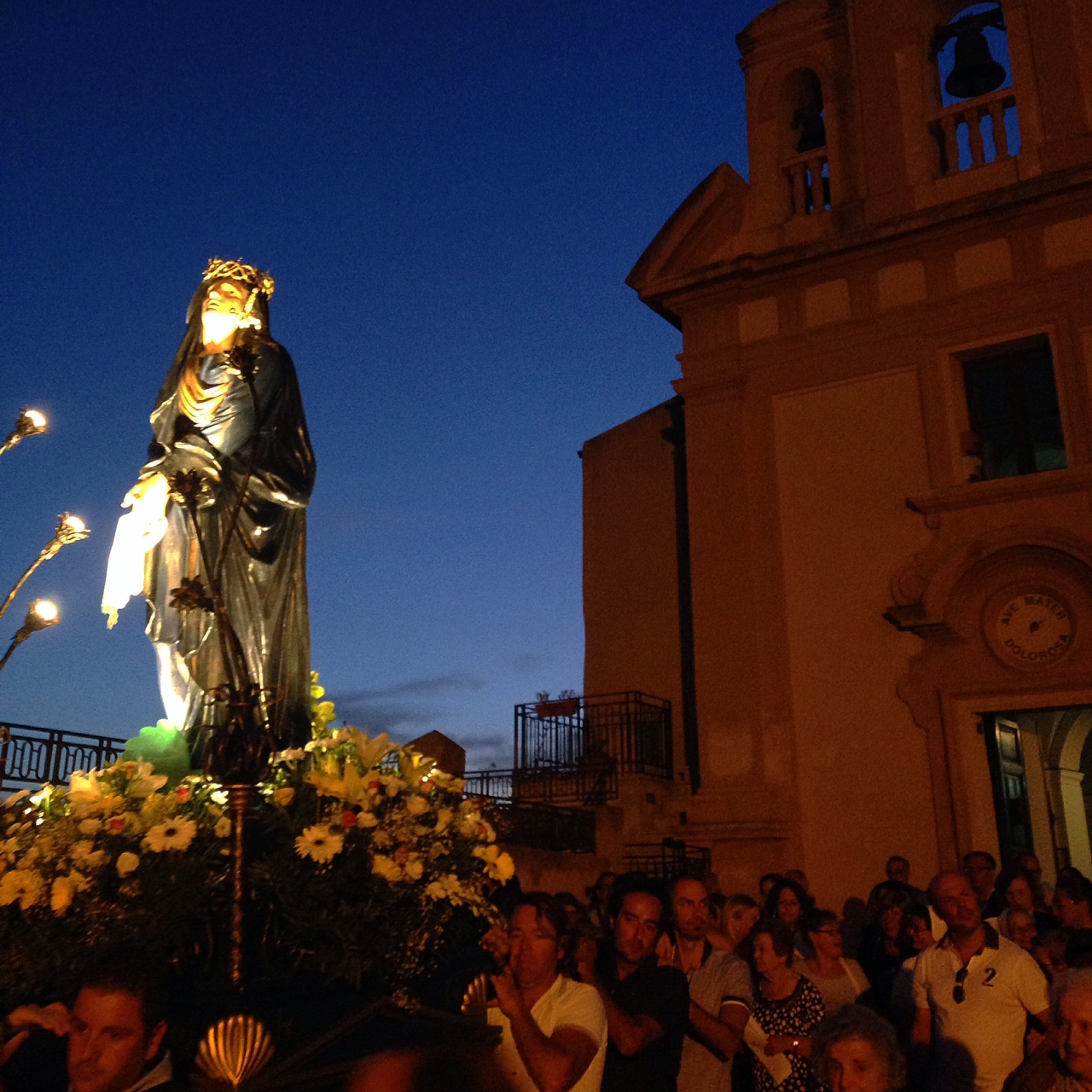 Madonna Addolorata di Agrigento